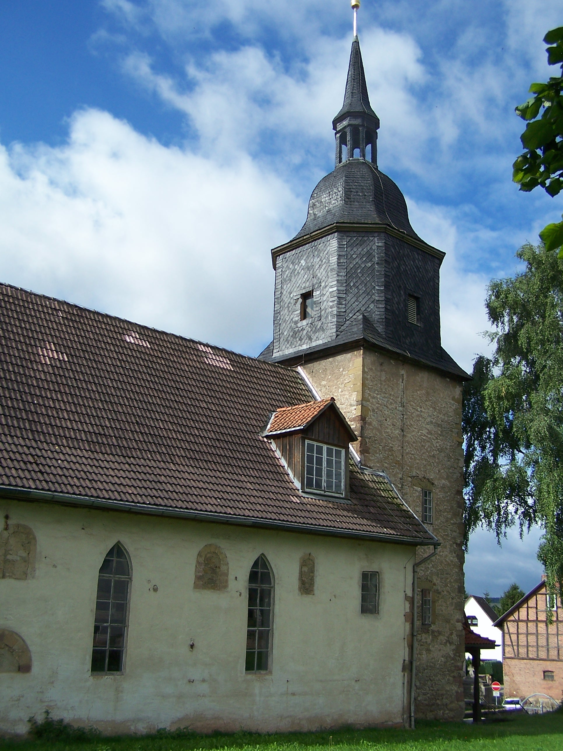 Die Kirche St.Peter und Paul in Großenlupnitz.